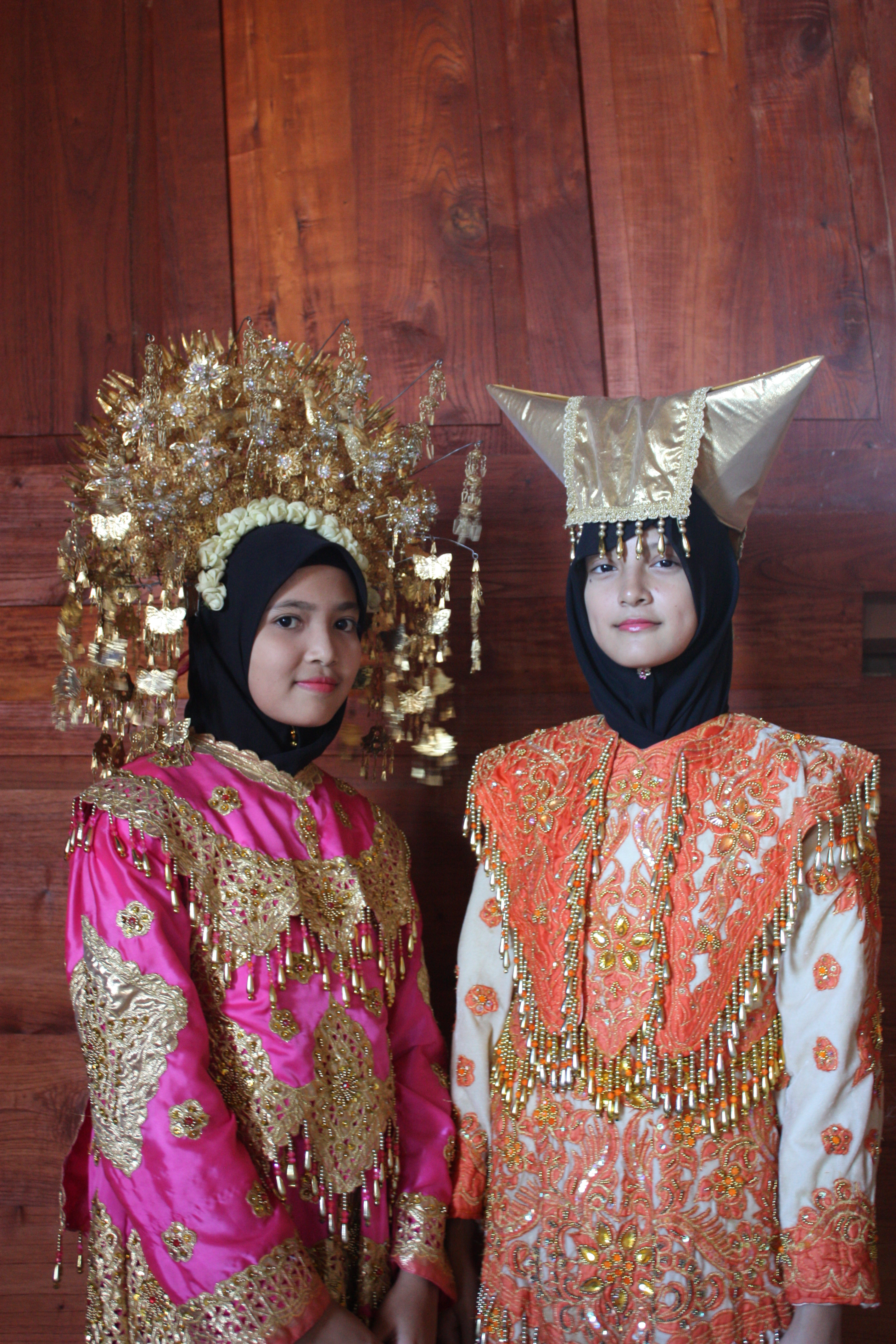 Around Bukittinggi, Istano Silinduang Bulan, Malaysian girls posing in Minangkabau costumes